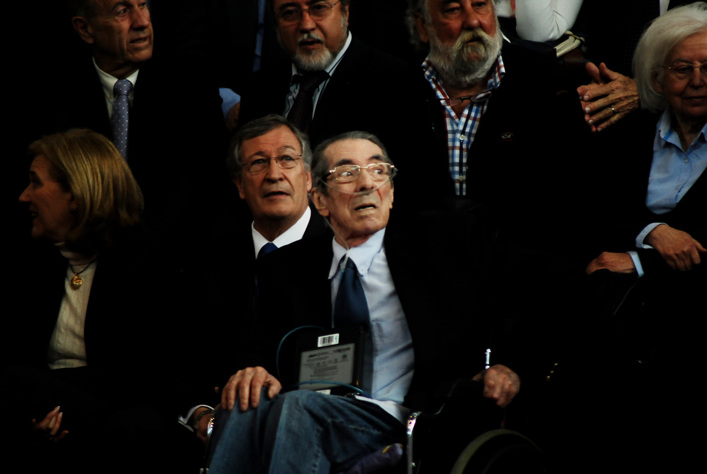 El periodista español Enrique Meneses